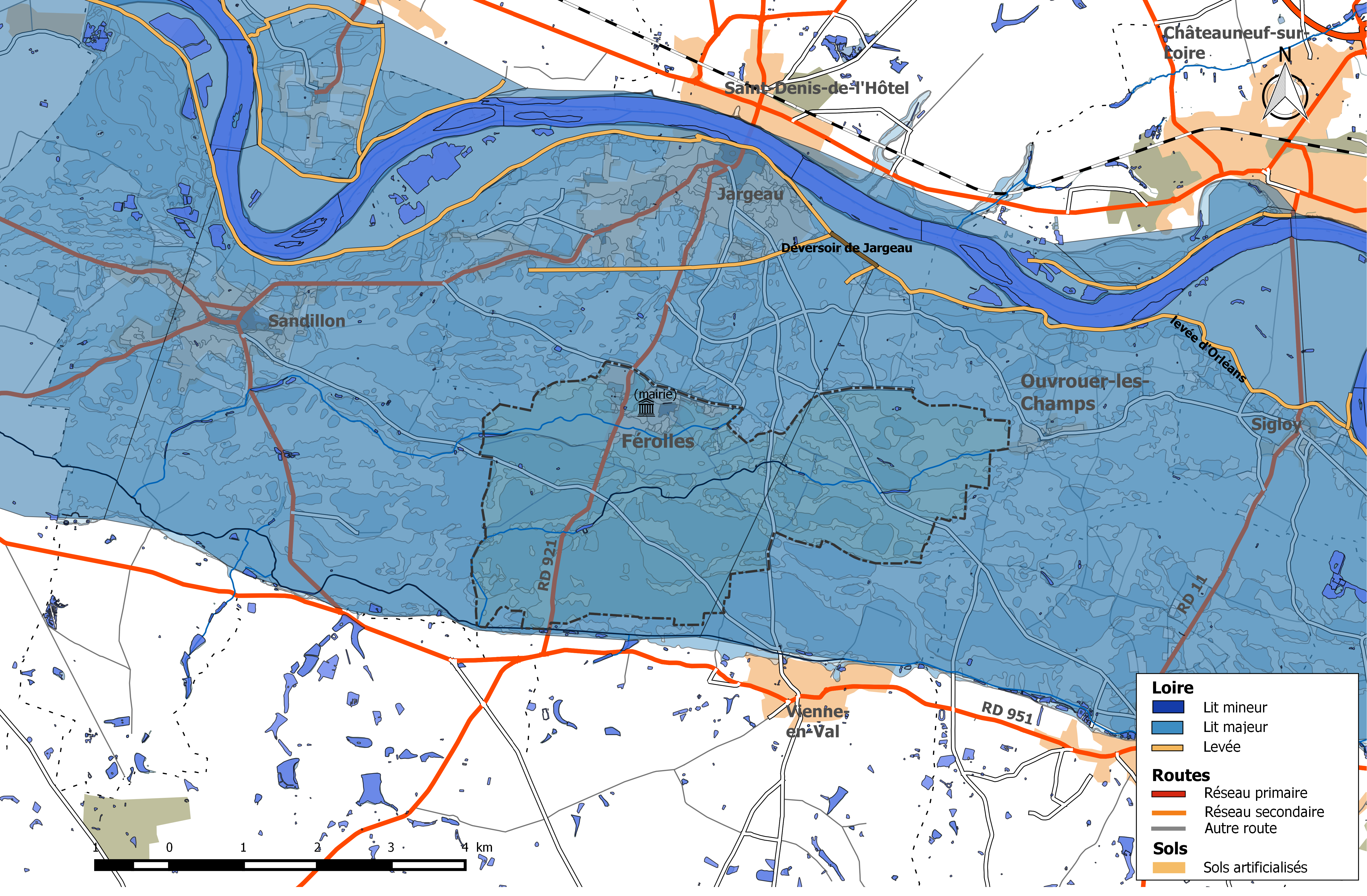 Zone inondable et réseaux hydrographique et routier de la commune de Férolles.